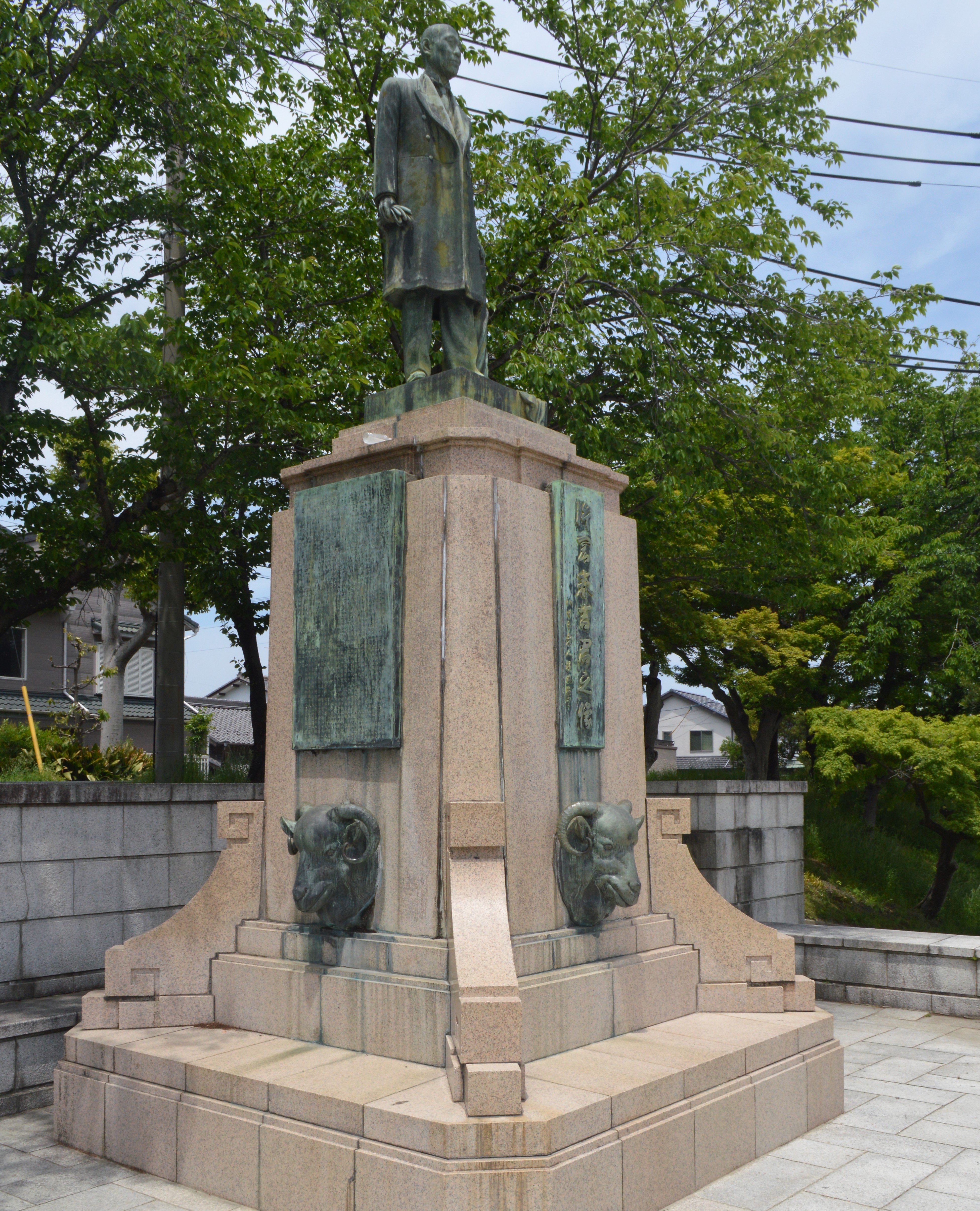 愛知県津島市の天王川公園にある片岡春吉の銅像。